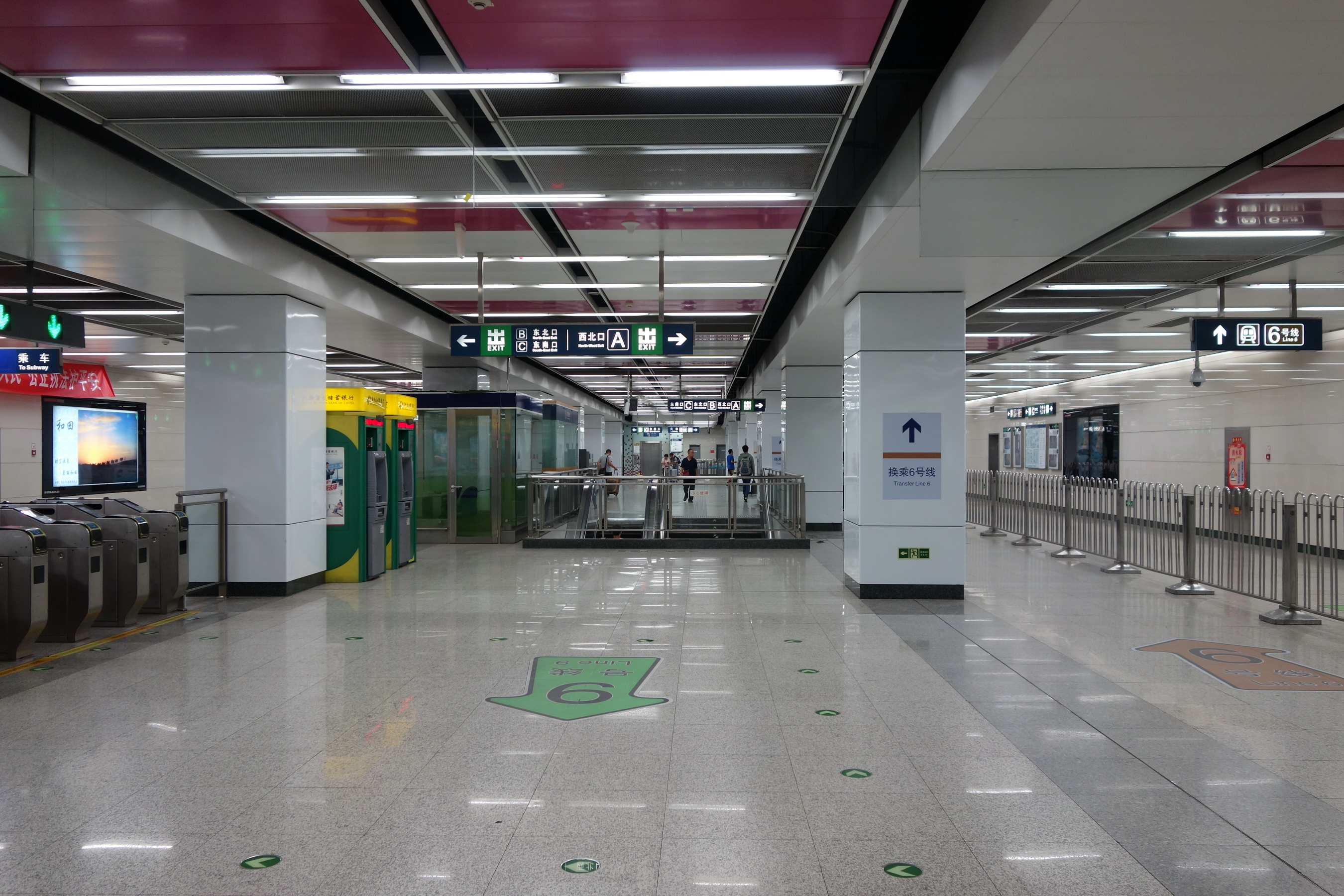 北京地铁9号线白石桥南站站厅